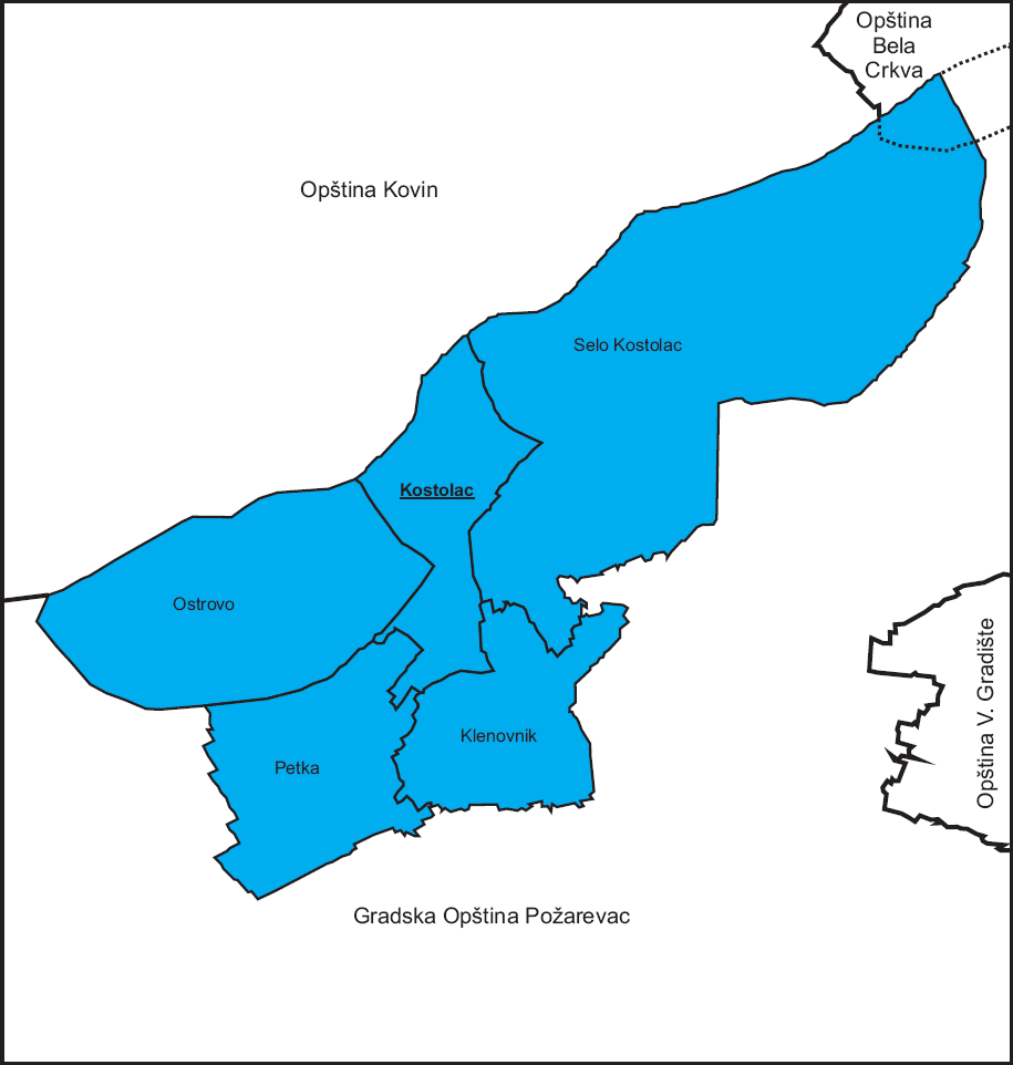 Mapa teritorije gradske opštine Kostolac, sa granicama naseljenih mesta i granicama okolnih opština; nepotvrđene granice katastarskih opština su prikazane isprekidanom linijom.